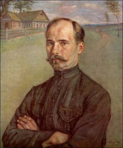 Партрэт Я. Коласа